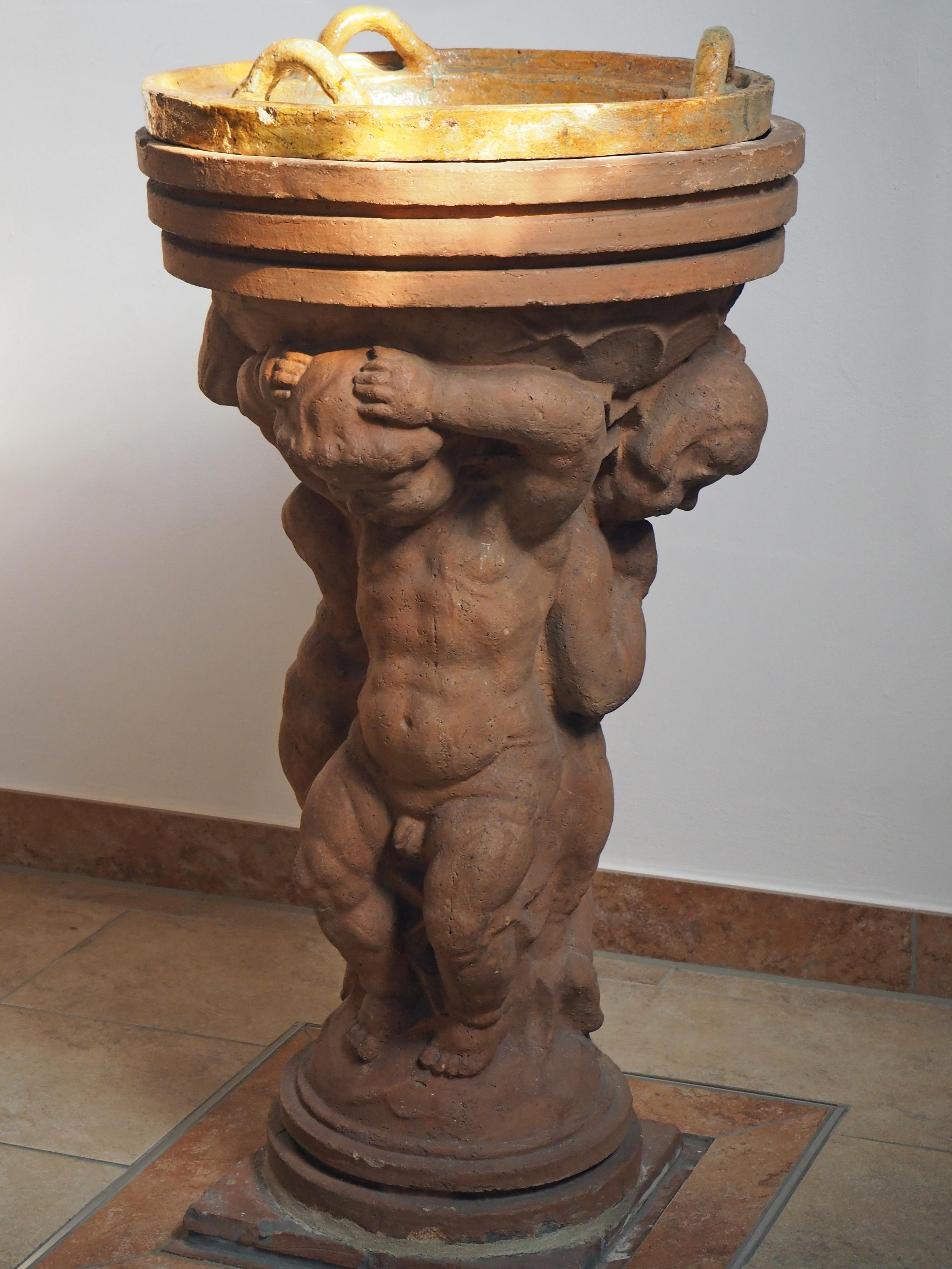 Schermbeck - St. Georgskirche - Taufe - Foto von 2015